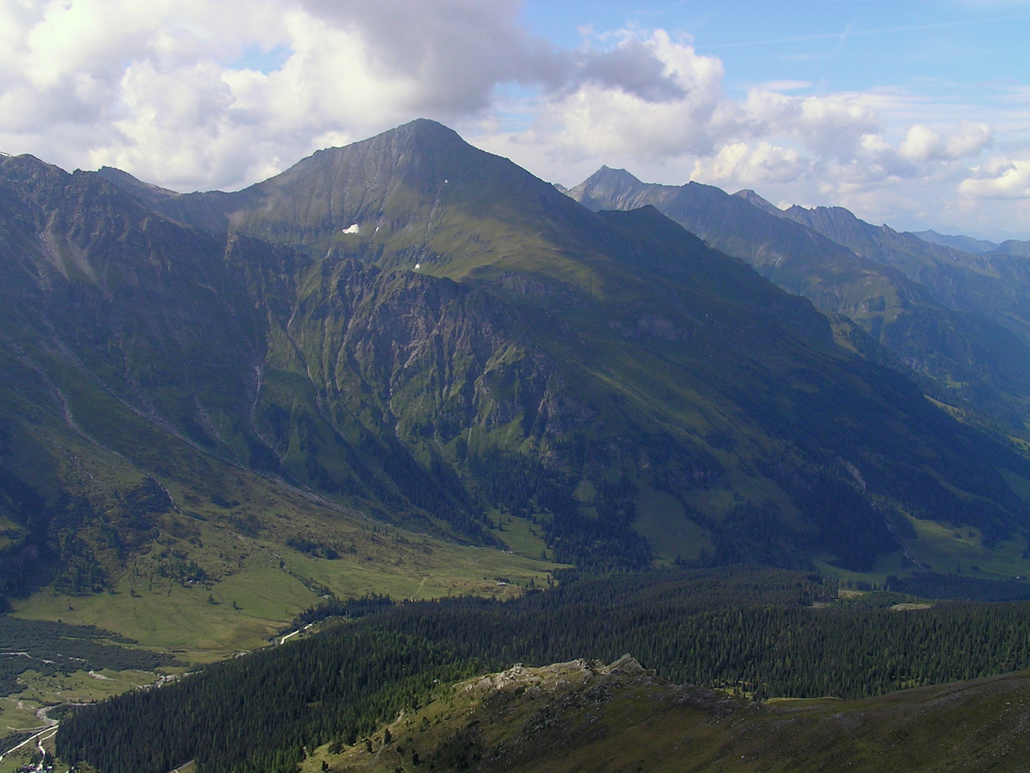 Der Ritterkopf von Südosten aus gesehen